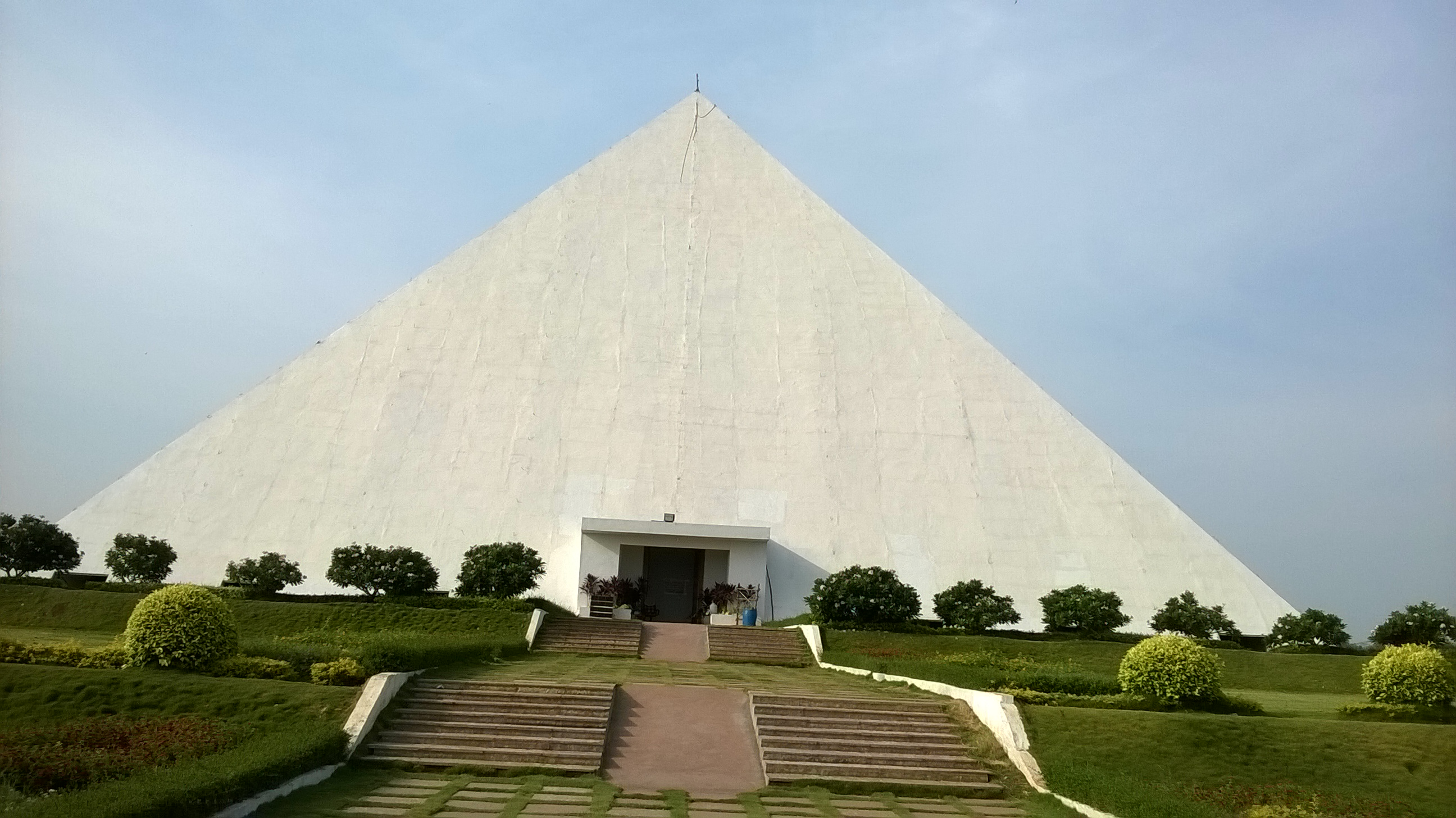 కడ్తాల్‌లో బుద్ధా పిరమిడ్